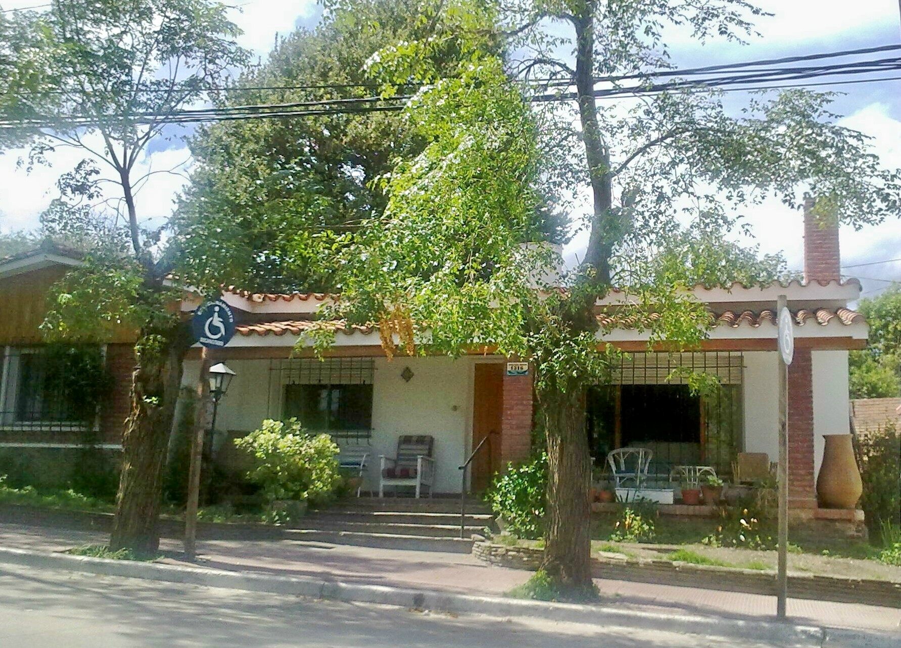 Casa donde vivió Jorge Recalde, en Mina Clavero, Provincia de Córdoba, Argentina.